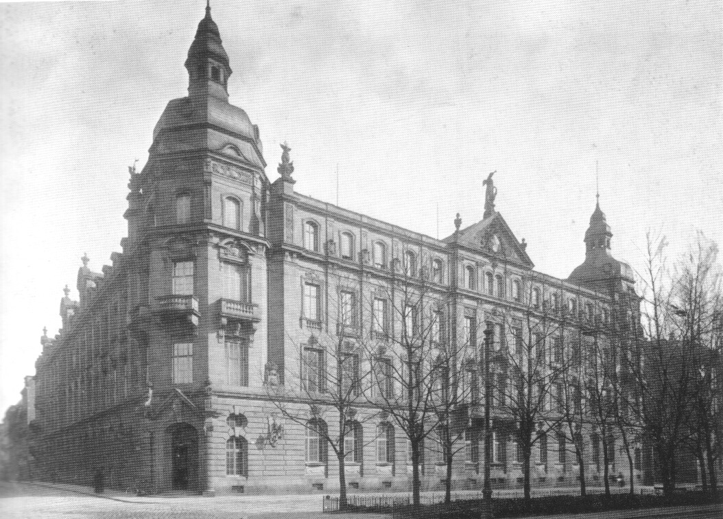 Großherzogliches Bezirksamt in L 6, um 1906